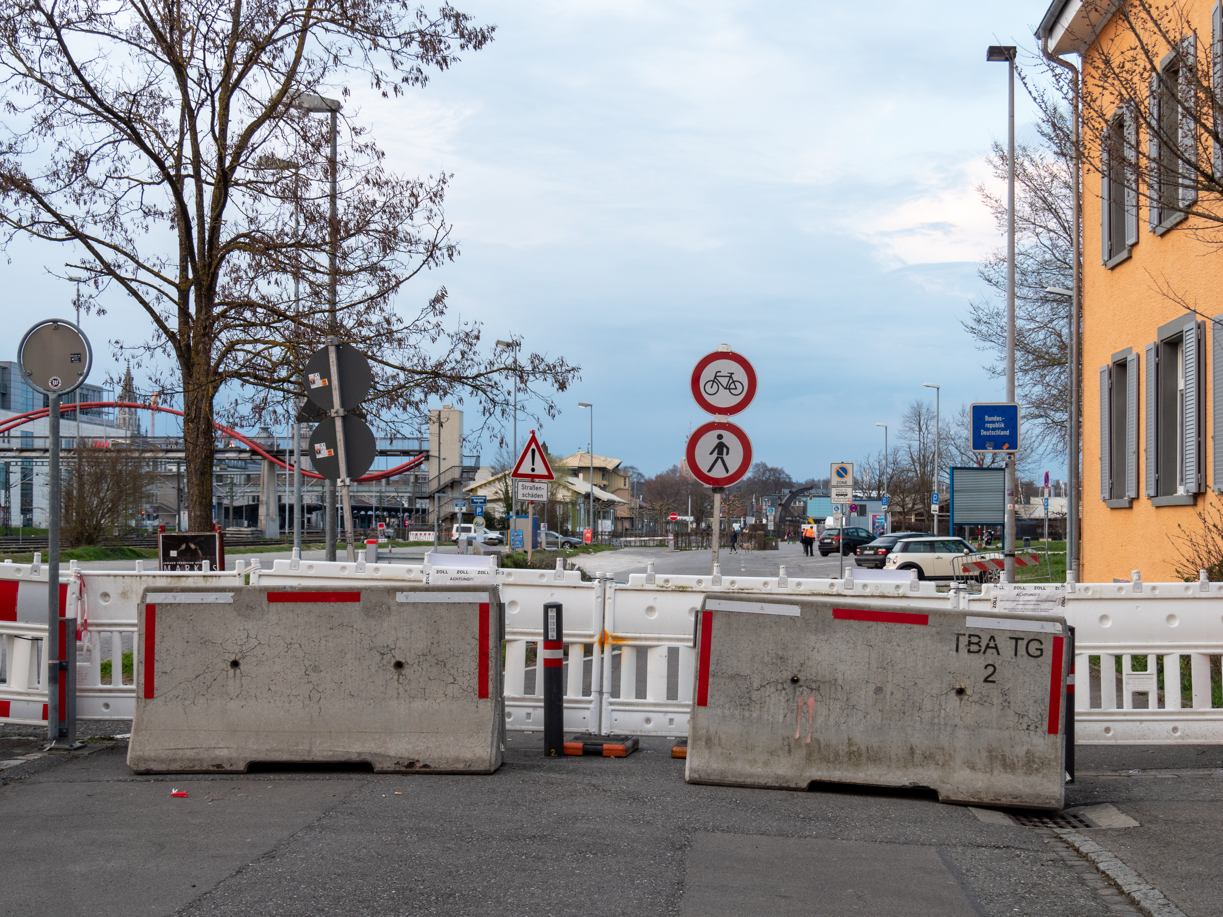 Der Grenzübergang Seestrasse zwischen Kreuzlingen und Konstanz ist wegen des Coronavirus im März 2020 gesperrt.